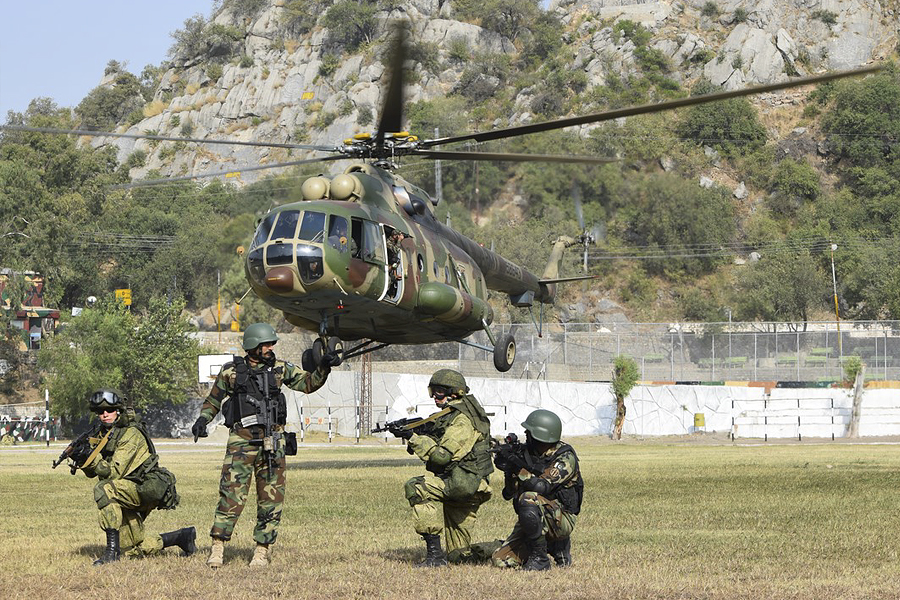 Тренировка по десантированию из вертолетов военнослужащих России и Пакистана на учении «Дружба-2016»